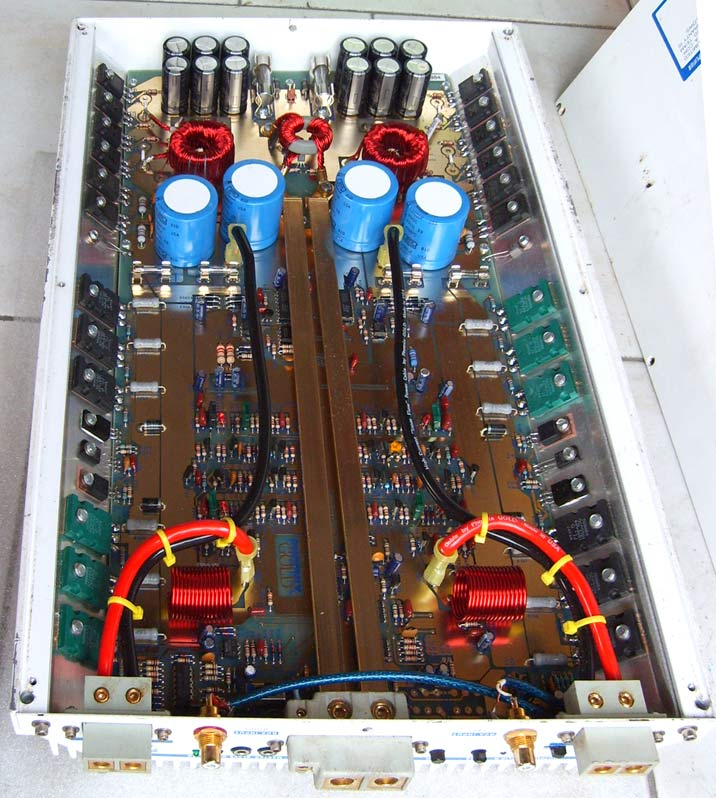 Amplificatore per Auto Phoenix gold ms 2125 lato amplificatore audio